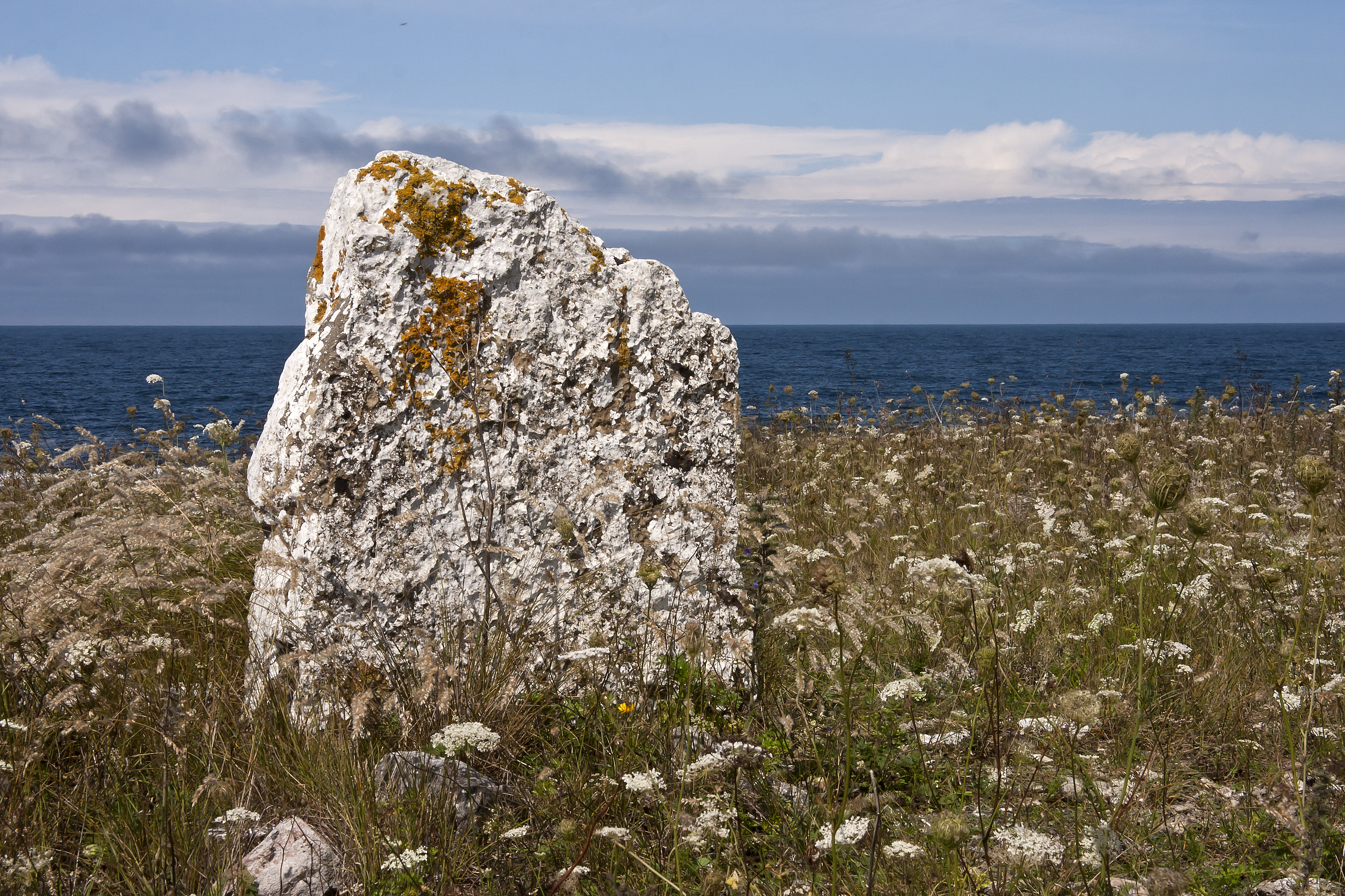 En rest sten på gravfältet på Neptuni åkrar på Öland.